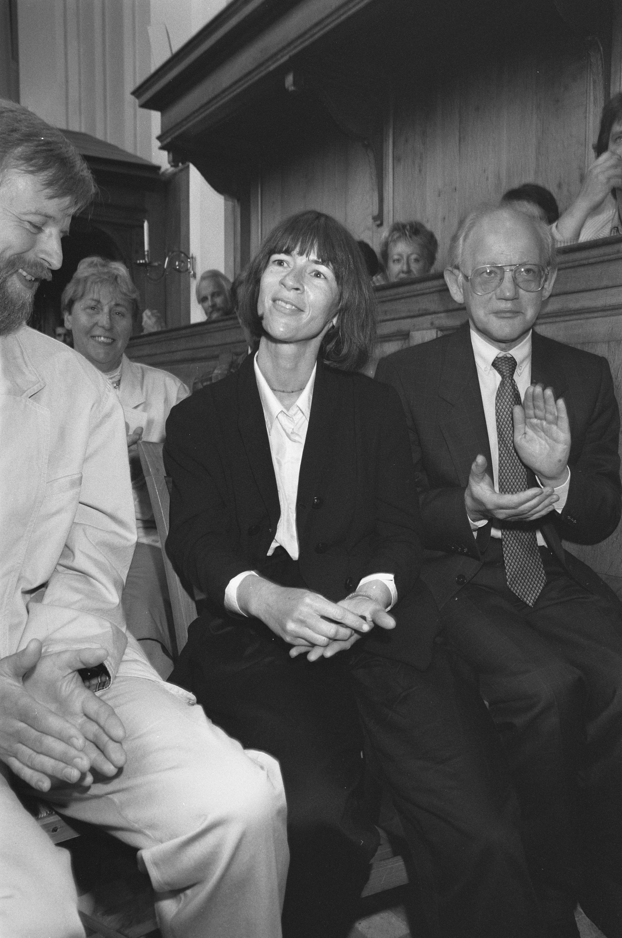 Collectie / Archief : Fotocollectie Anefo Reportage / Serie : [ onbekend ] Beschrijving : Roland Holst herdenking in Bergen; dichteres Eva Gerlach met A. Roland Holst Penning Datum : 8 juni 1988 Locatie : Bergen Trefwoorden : dichters Persoonsnaam : A. Roland Holst Penning, Eva Gerlach Fotograaf : Croes, Rob C. / Anefo Auteursrechthebbende : Nationaal Archief Materiaalsoort : Negatief (zwart/wit) Nummer archiefinventaris : bekijk toegang 2.24.01.05 Bestanddeelnummer : 934-2631